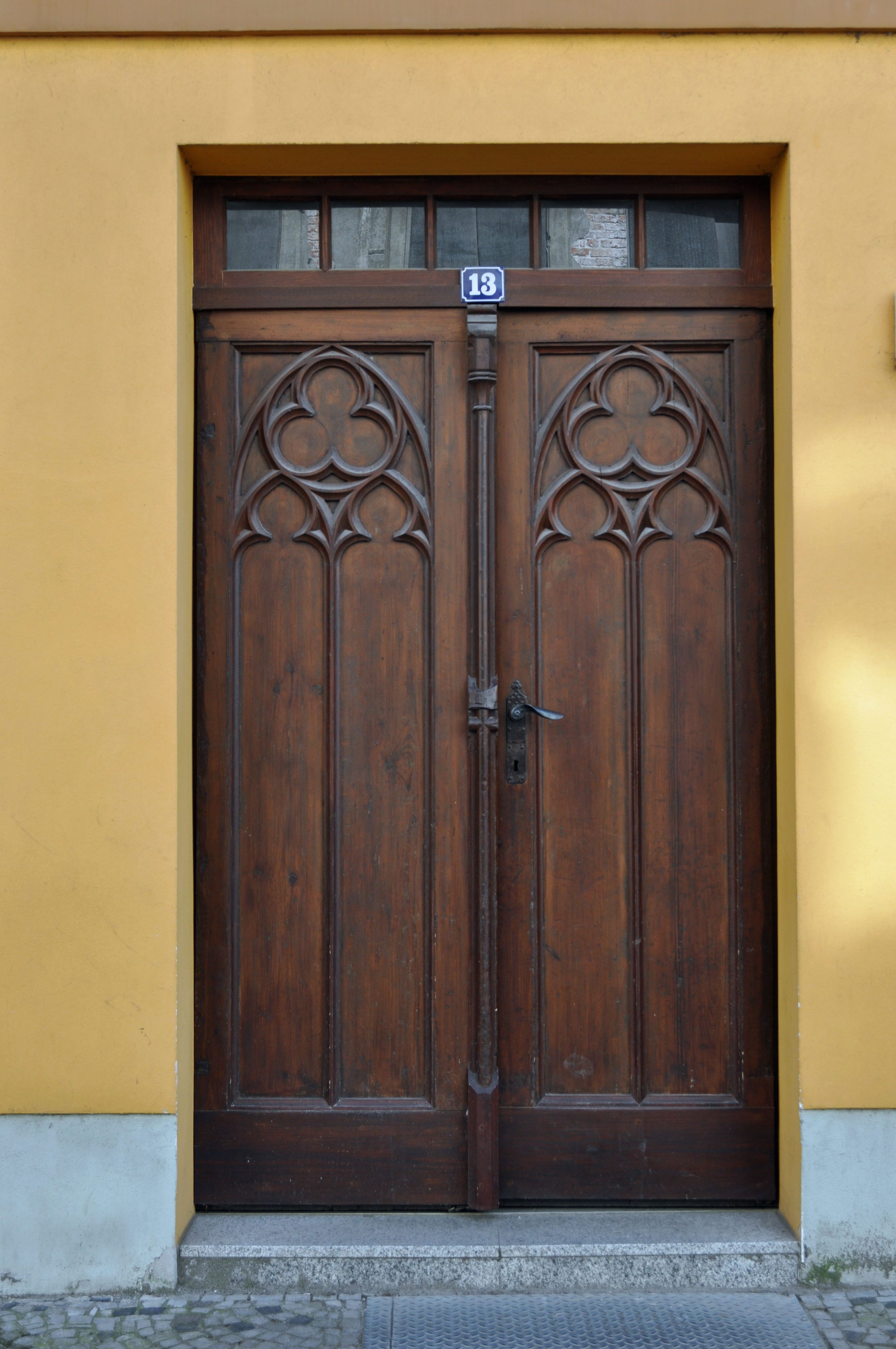 Gebäude bzw. Gebäudedetail in Stralsund. Straße und Hausnummer siehe Dateiname.